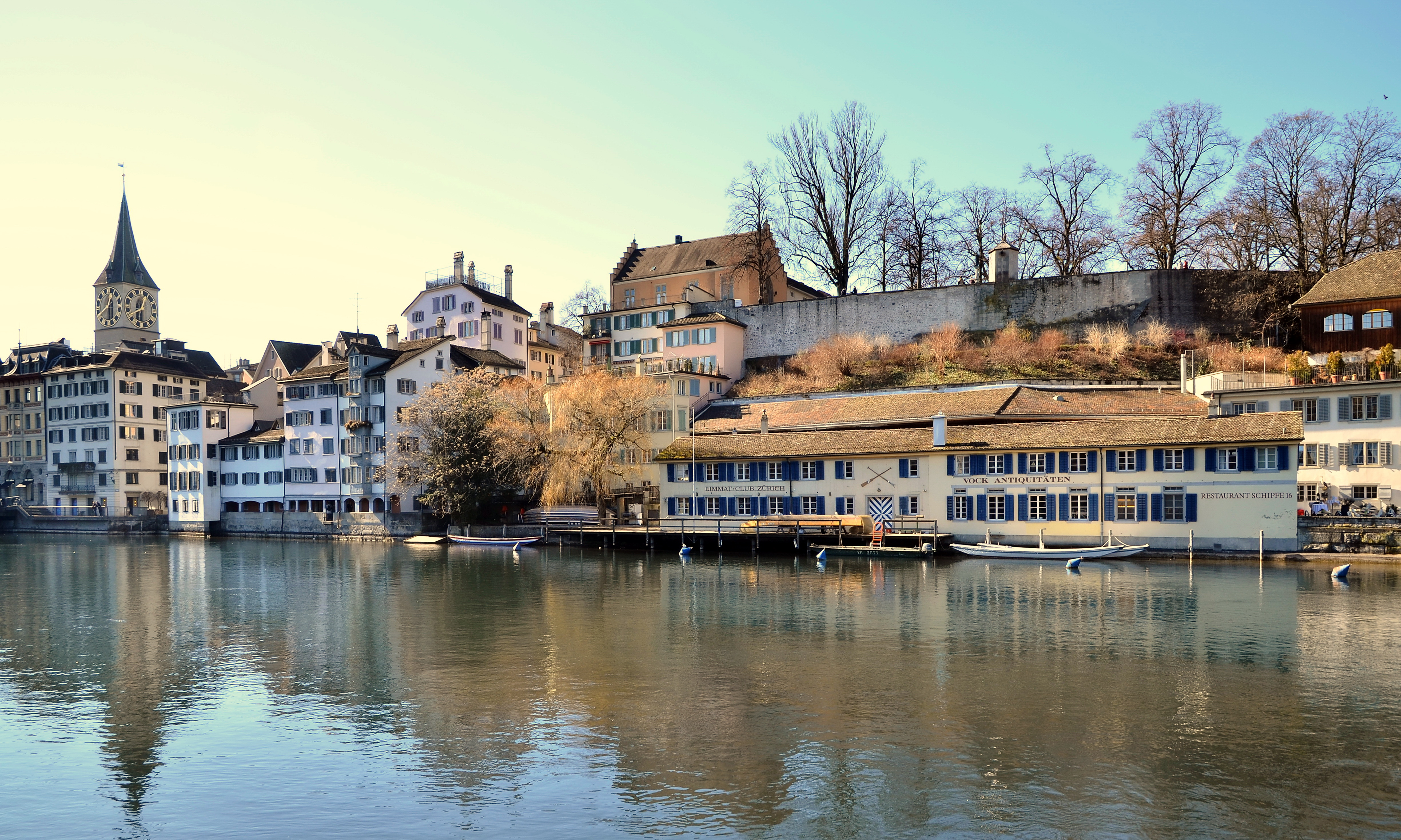 Schipfe and Lindenhof hill as seen from Limmatquai Rathausbrücke (Gmüesbrugg) in Zürich (Switzerland)